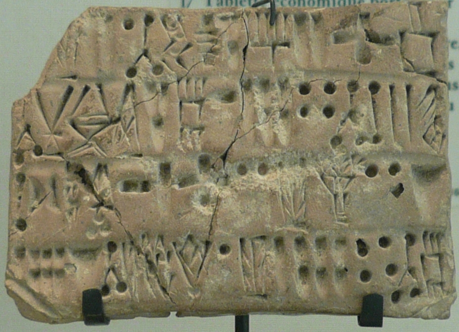 Tablet in Elamite language, from Louvre